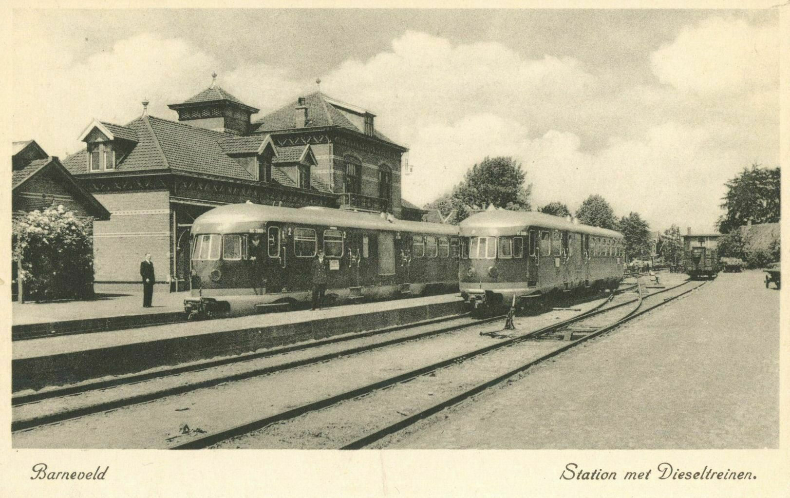 Gezicht op het N.S.-station Barneveld te Barneveld, met twee stroomlijn motorrijtuigen van het type omBC (serie 2901-2908) van de N.S.